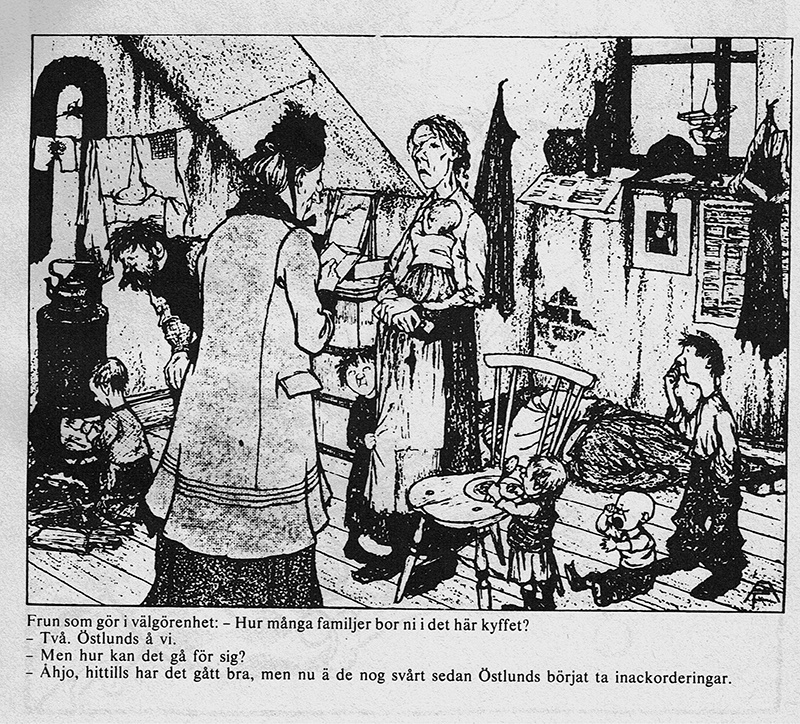 Från svenska hem. Drawing.